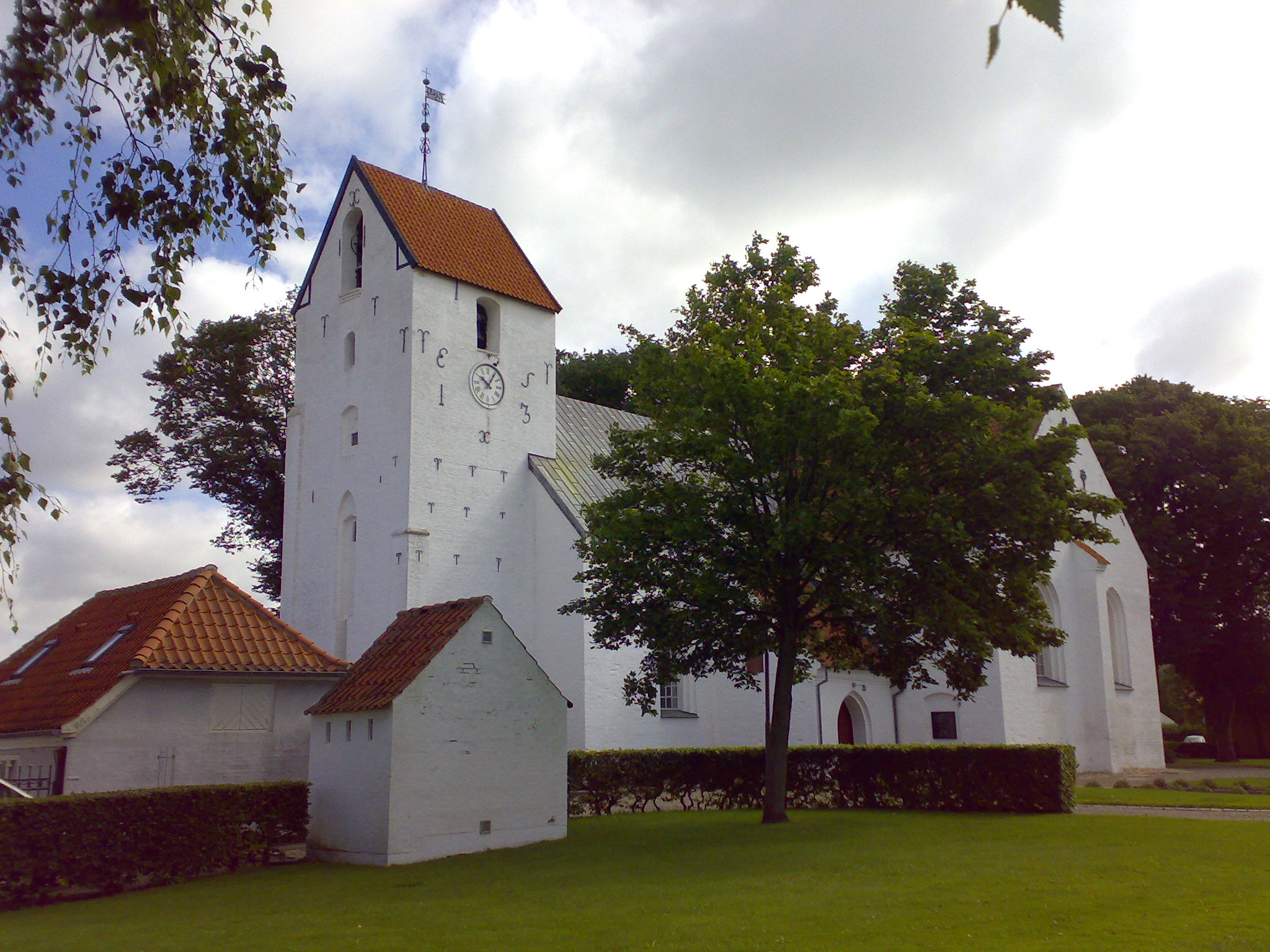 Nibe church, Denmark